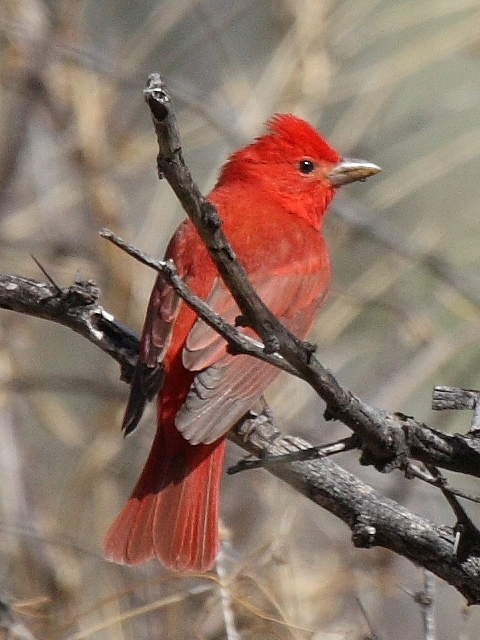 Summer Tanager (Piranga rubra)